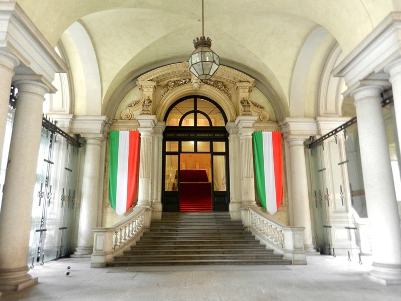 Torino - Ingresso del Museo del Risorgimento ospitato negli ambienti di Palazzo Carignano